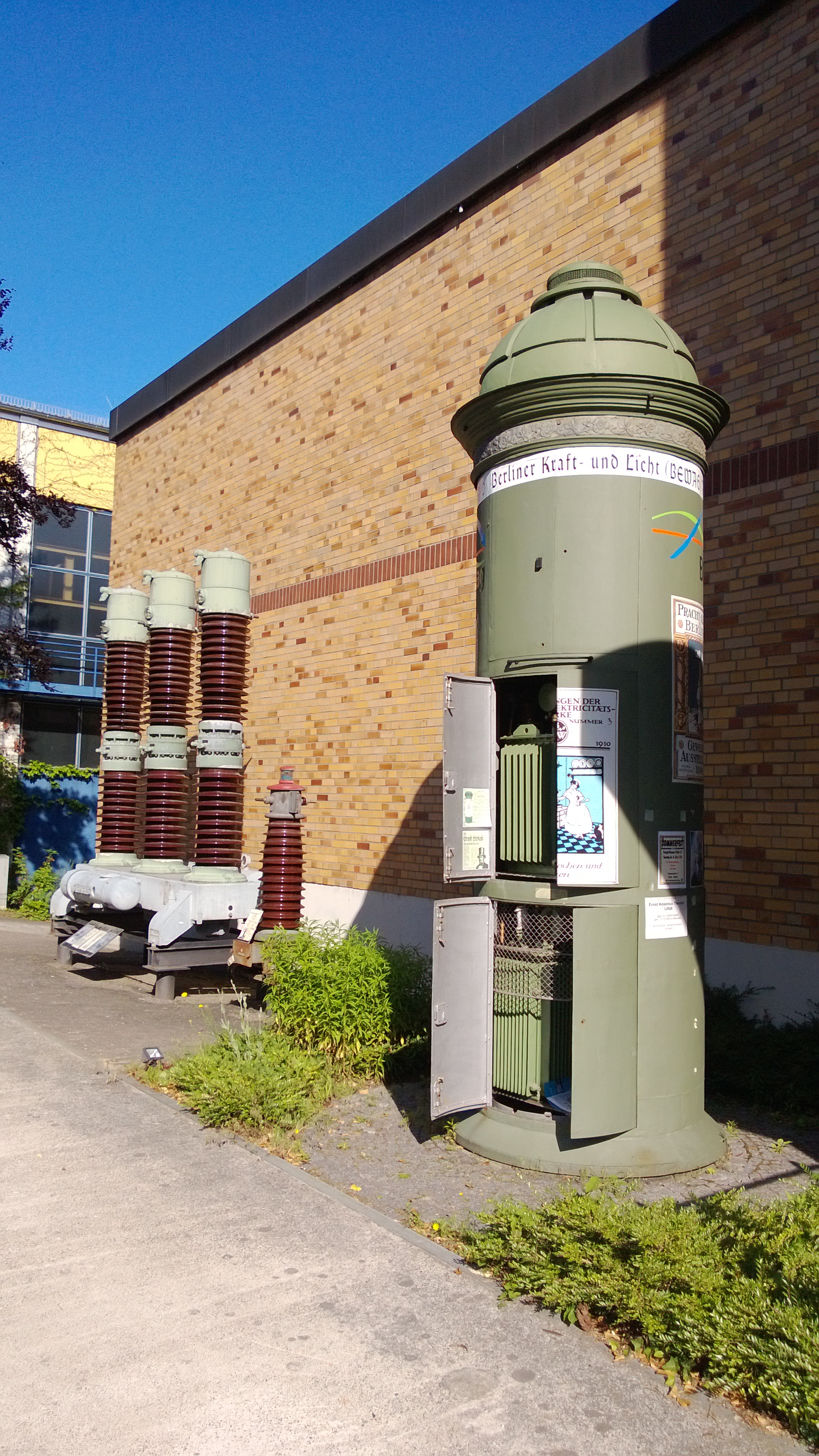 Litfaßsäulen-Transformator, wie er in Berlin einige Zeit eingesetzt wurde